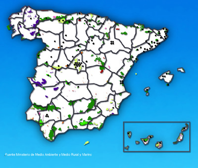 Mapa de España con los Centros RECIDA